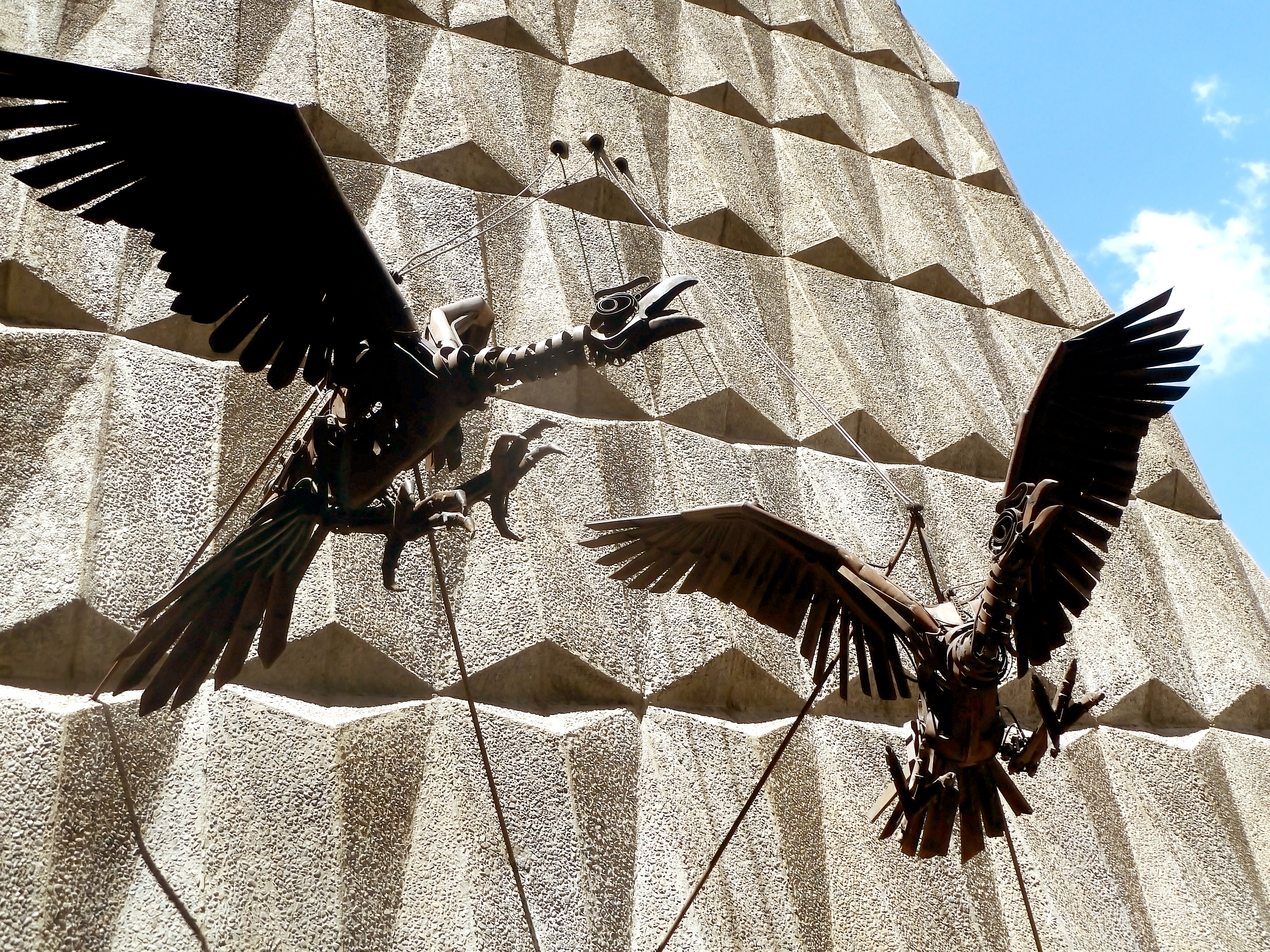 Cóndores This medium shows the protected monument with the number L/00-214 in Bolivia.